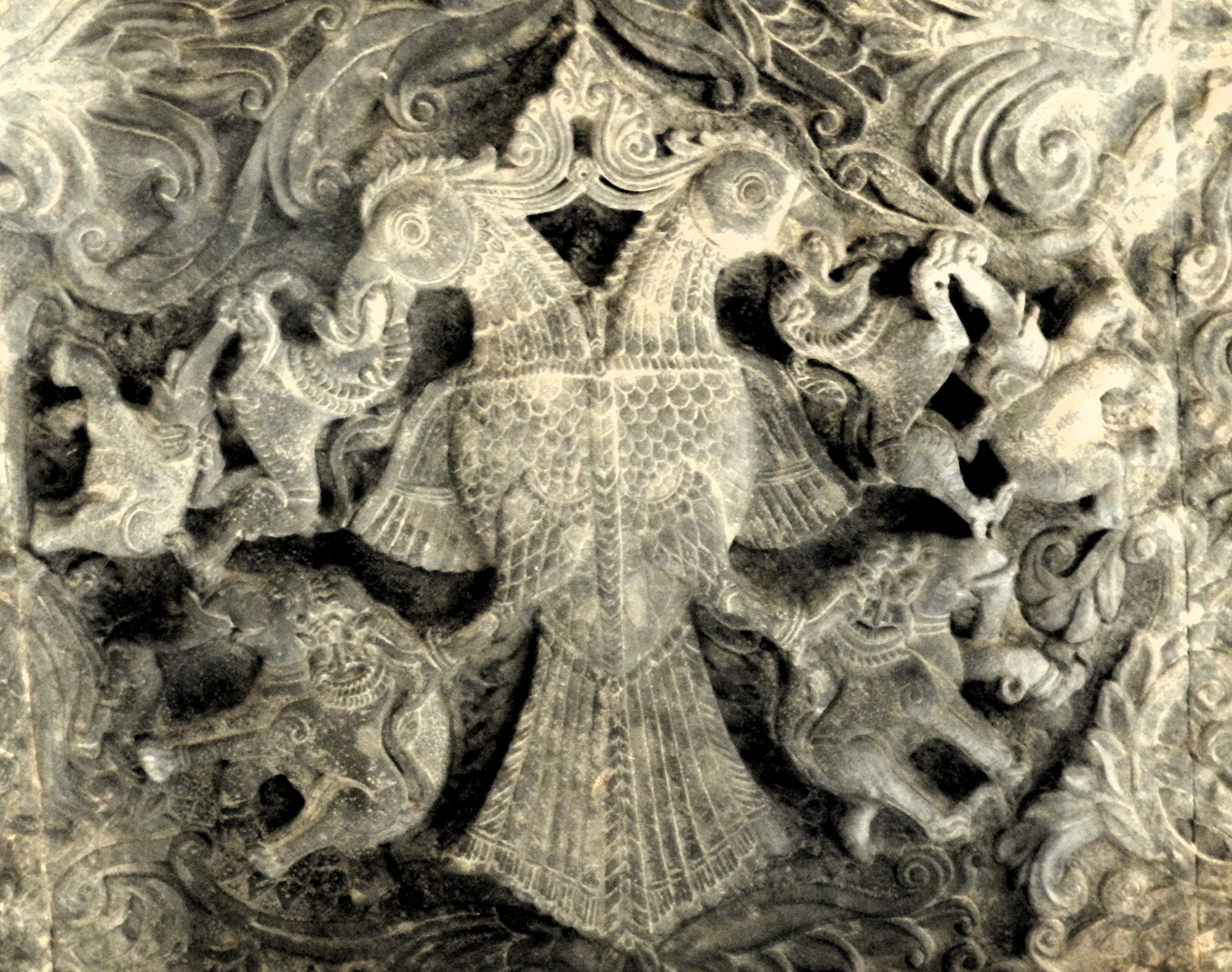 ಕನ್ನಡ: ಕೆಳದಿ ರಾಮೇಶ್ವರ ದೇವಾಲಯದಲ್ಲಿರುವ 'ಗಂಡಭೇರುಂಡ'ದ ಚಿತ್ರ